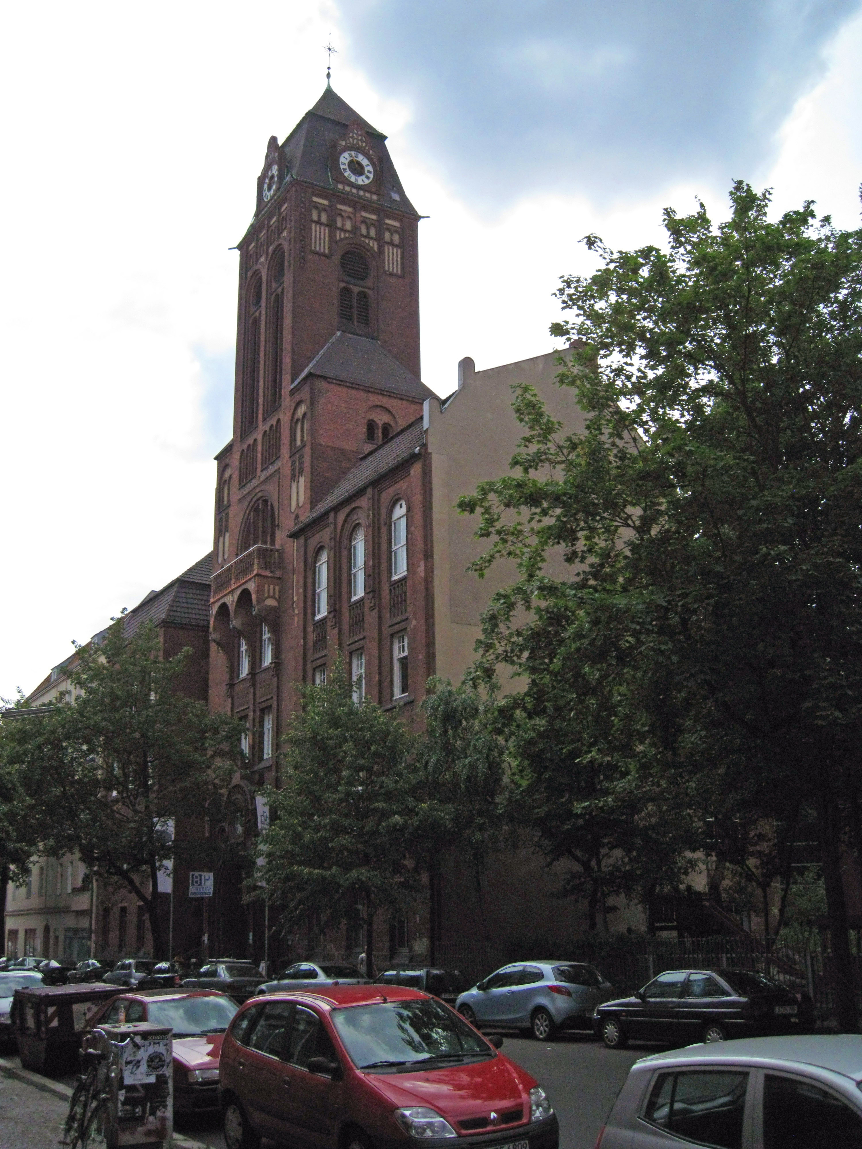 Martin-Lutherkirche (Berlin-Neukölln)